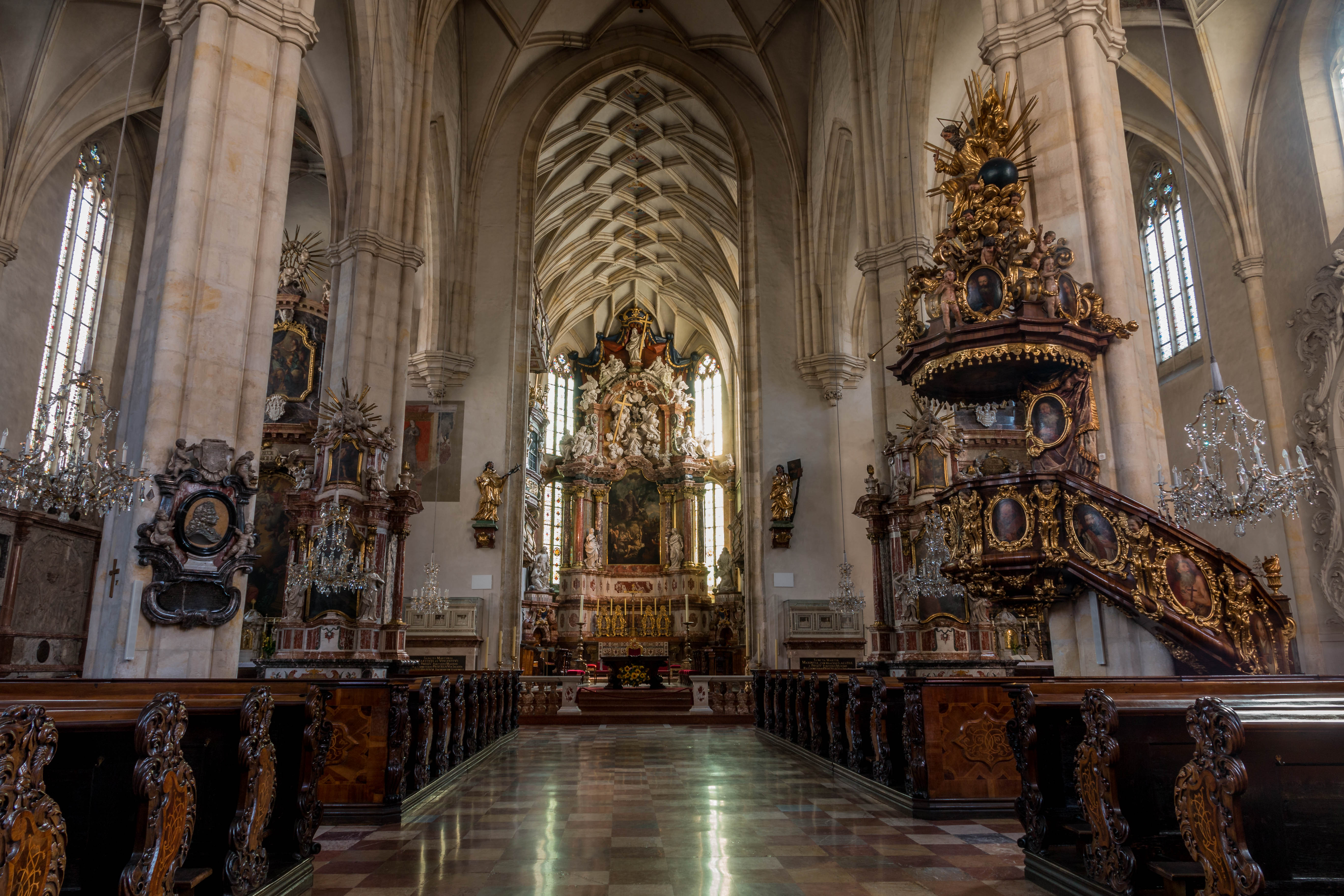 Langschiff des Grazer Dom